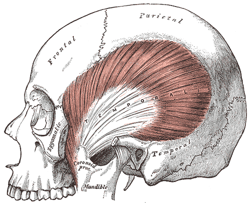 Musculus temporalis